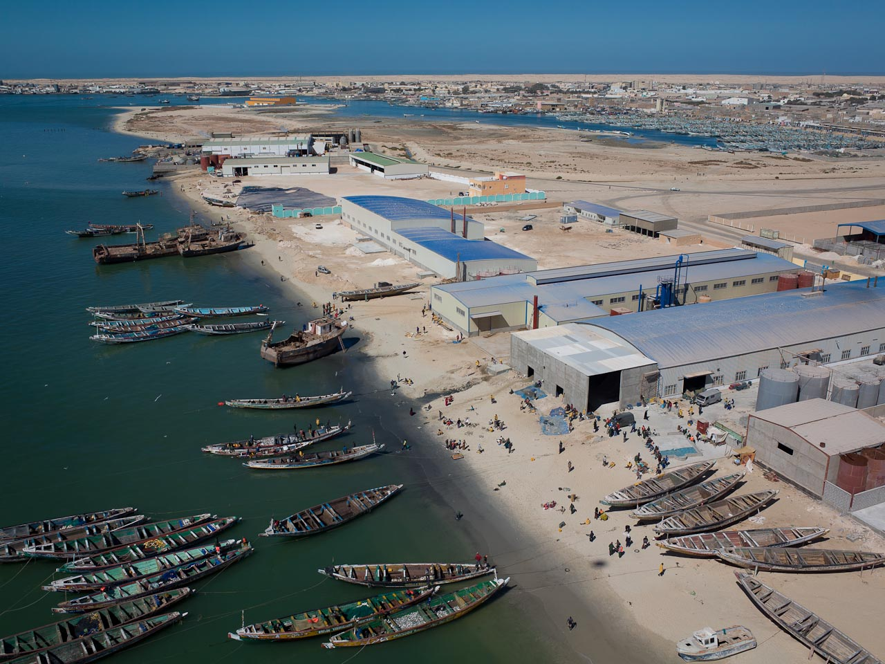 Pêche et patrimoine maritime